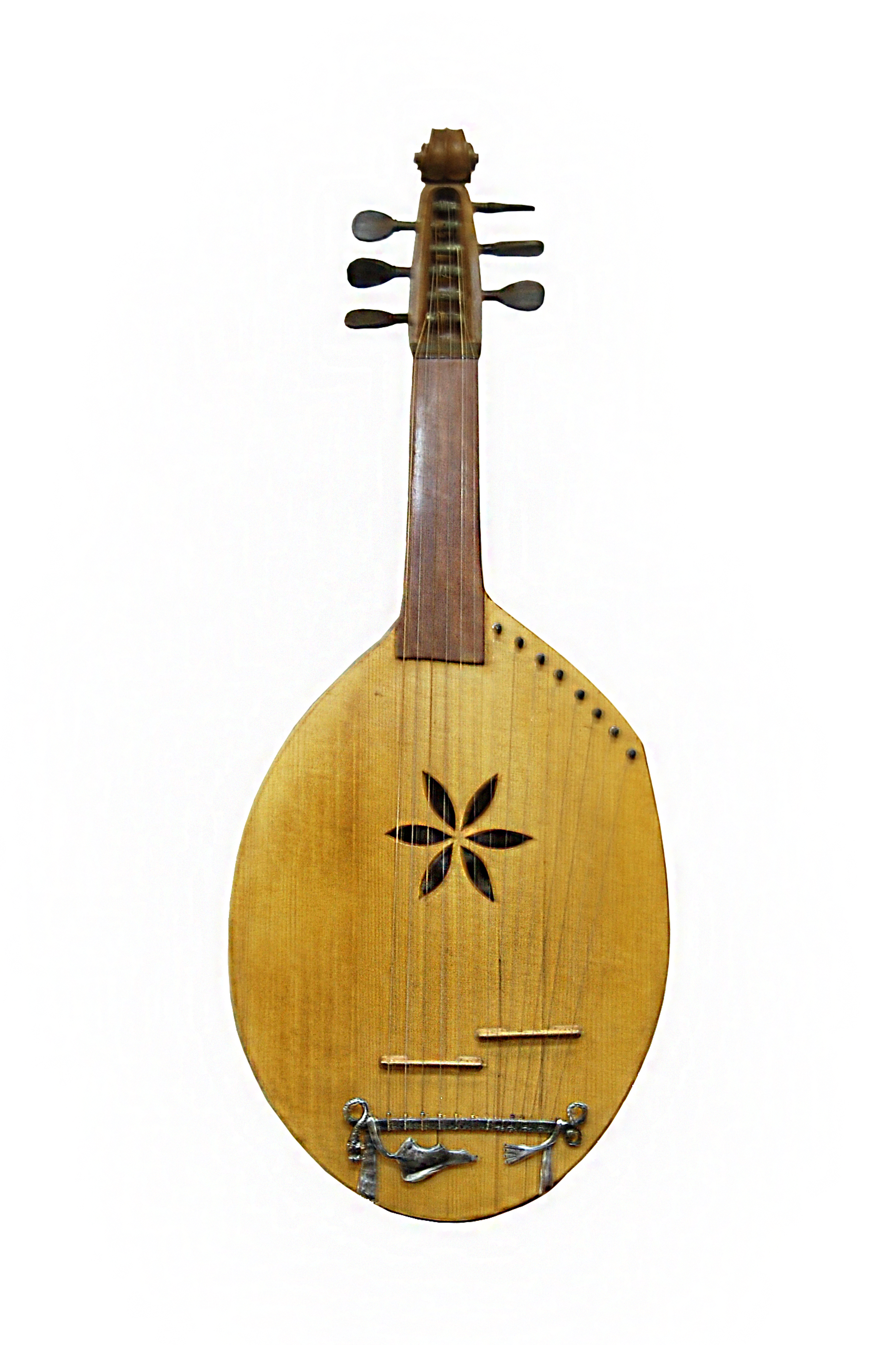 Kobza - 2013